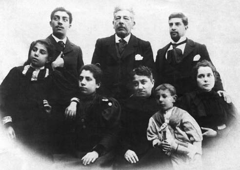 Arriba de esquerda a dereita: Darío Álvarez Limeses, Emilio Álvarez Giménez e Xerardo Álvarez Limeses. Abaixo de esquerda a dereita: María Álvarez Limeses (muller de Celso García de la Riega), Carmen Álvarez Limeses (muller de José Buela), Amalia Limeses Iglesias (muller de Emilio Álvarez Giménez) e o neno Xosé Álvarez Limeses, María Gallego Martínez (muller de Xerardo Álvarez Limeses).